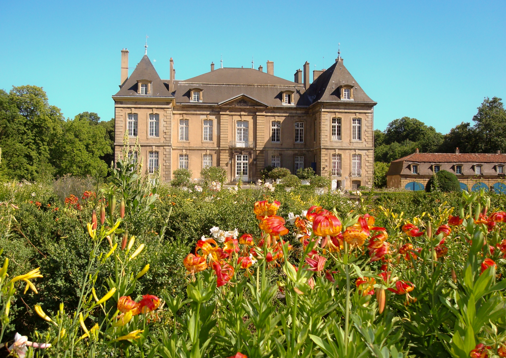 Le château de La Grange à Manom, vue depuis le jardin des lys.